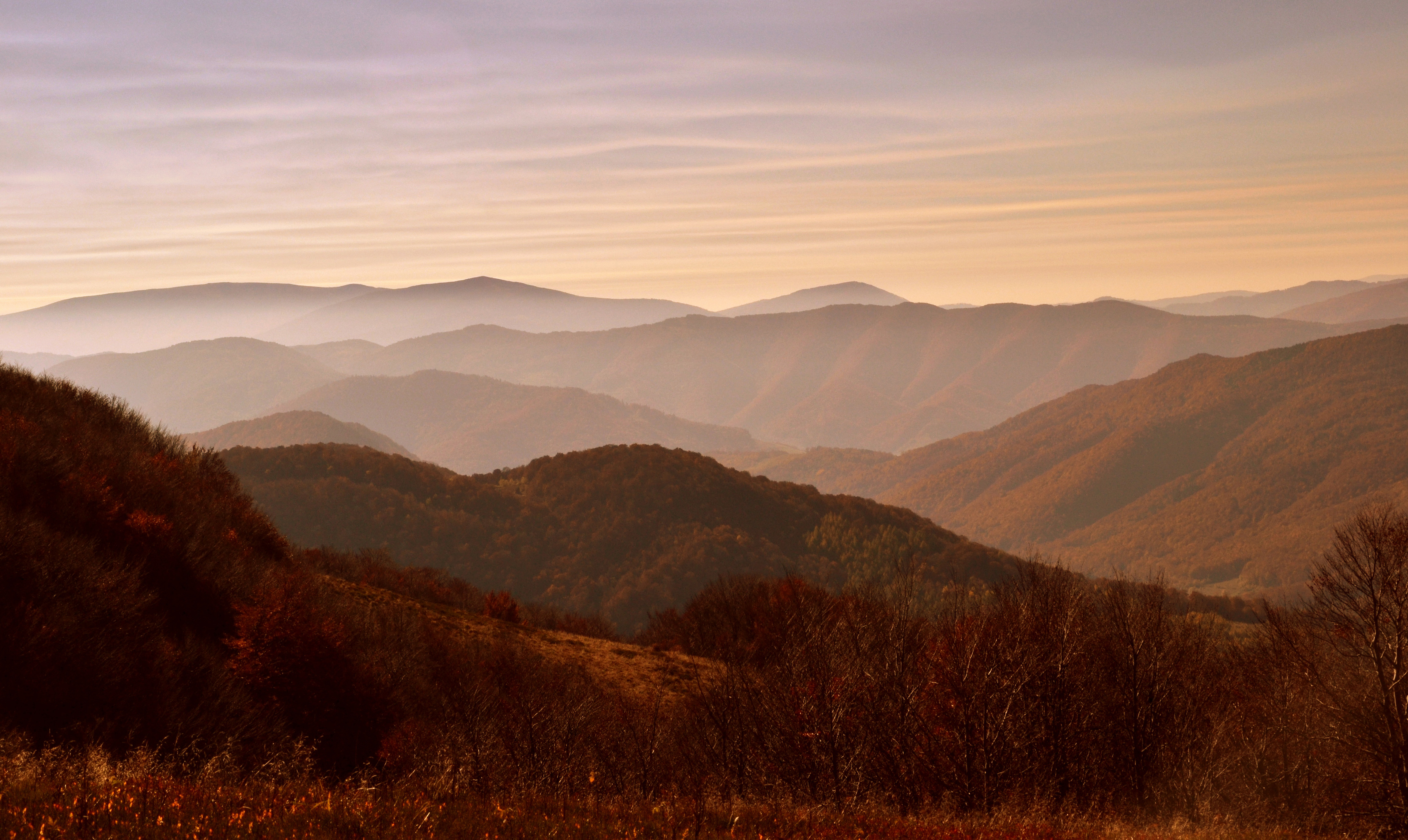 Park narodowy: Bieszczadzki Park Narodowy This is a photography of protected area with CRFOP ID PL.ZIPOP.1393.PN.7